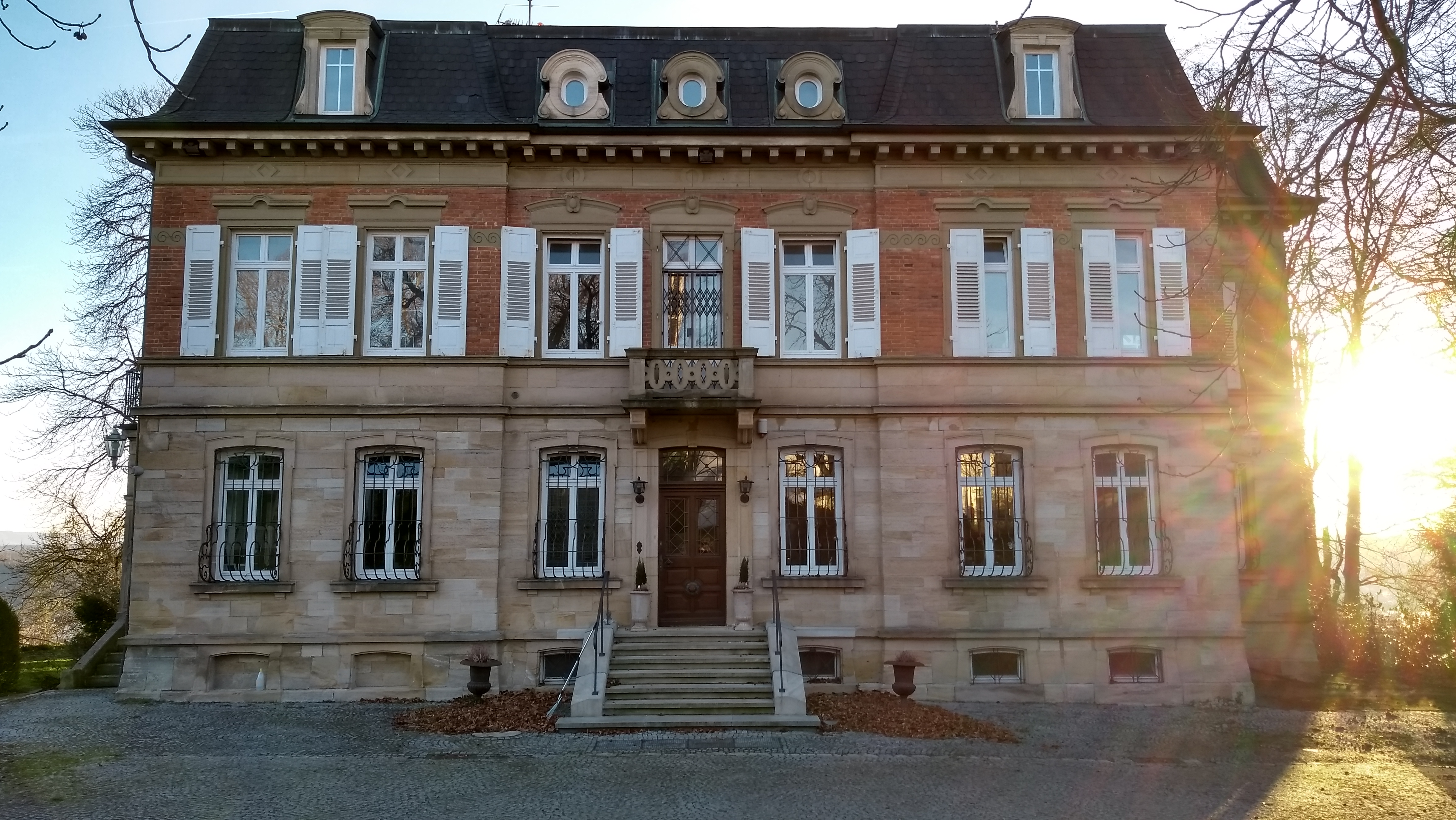 Villa Zenneck in Esslingen/Liebersbronn